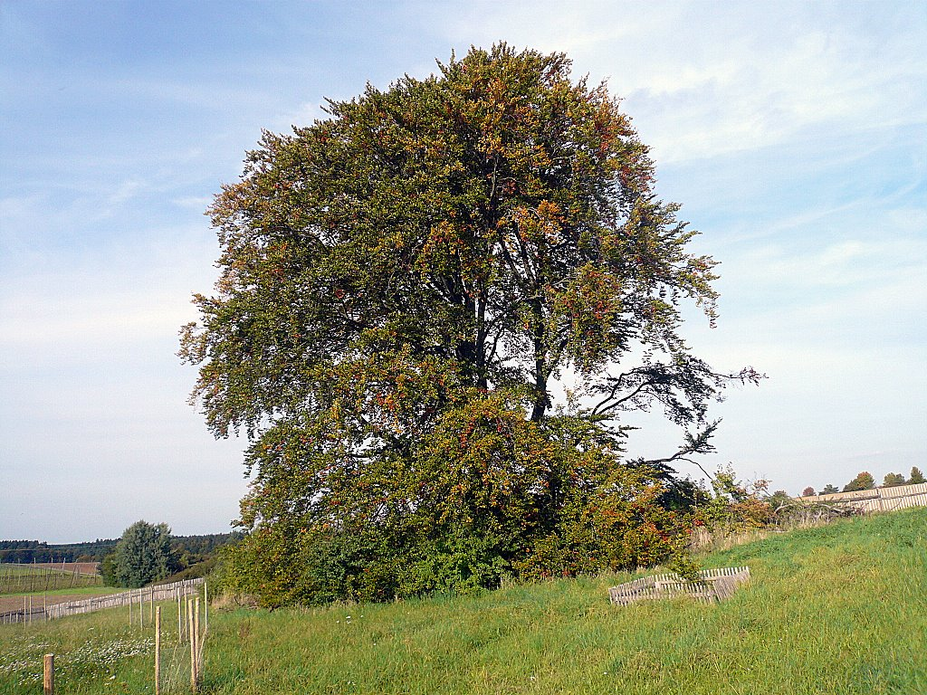 Bavariabuche